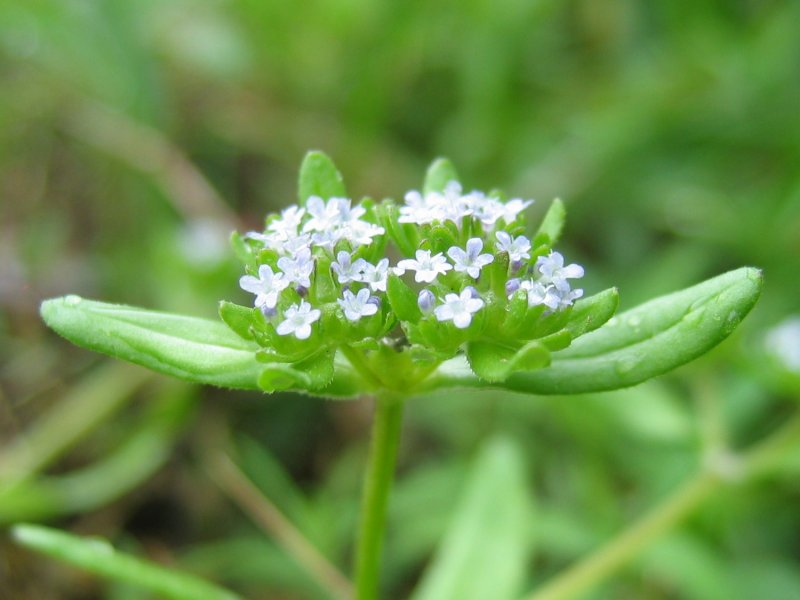 Feldsalat Valerianella locusta, Rügen